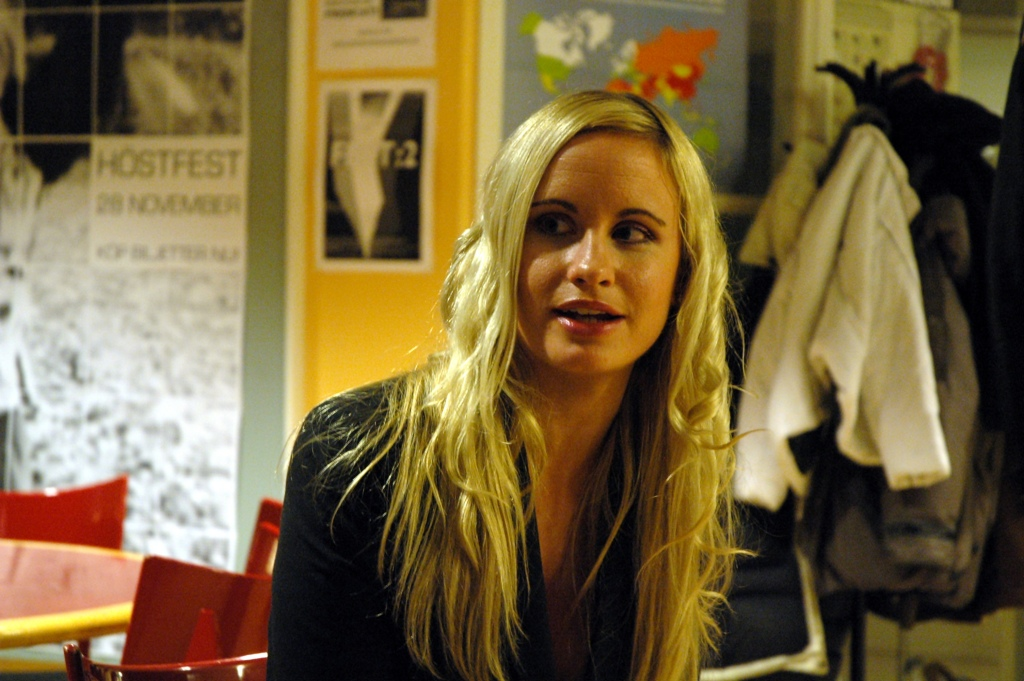 Karolina Lassbo (1980-)